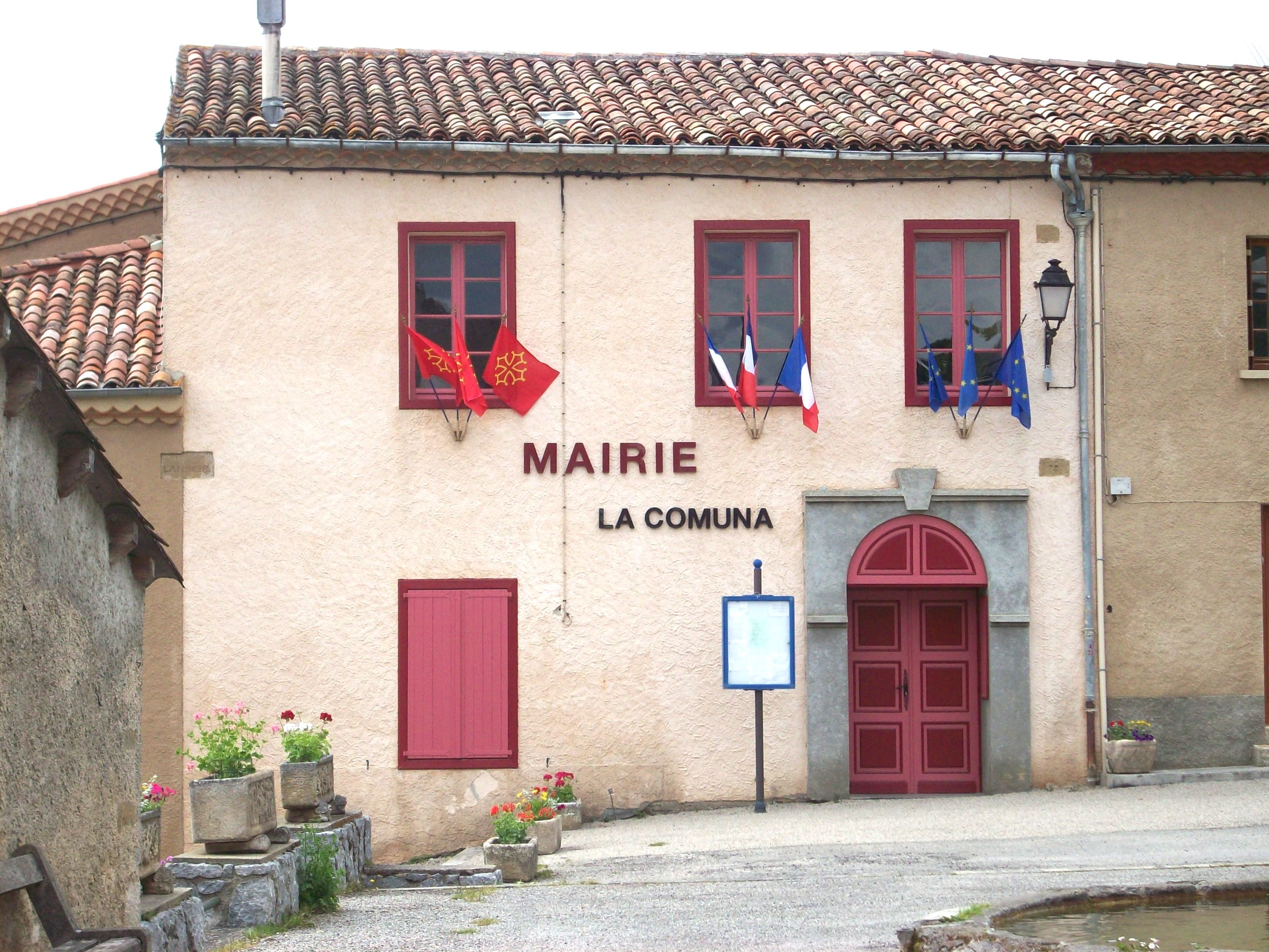 Mairie de Roquefixade (09)